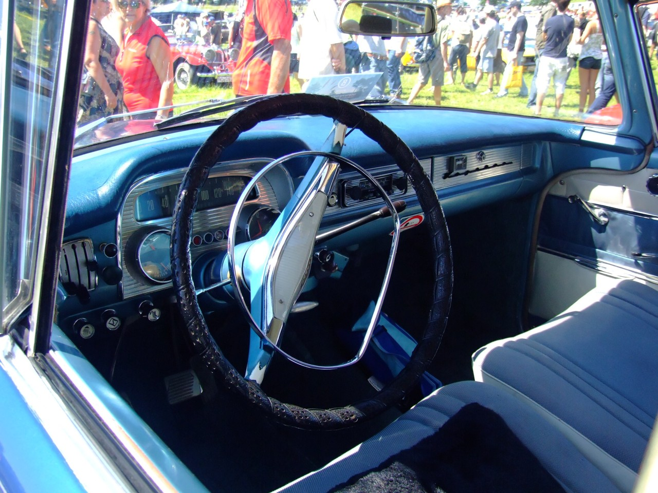 Quelle: selbst fotografiert, 06/2007 Fotograf: Späth Chr.